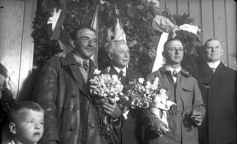 Der Weltrecord im Dauerfliegen mit 65 1/2 Sunden vorn Deutschland zurückerobert! Aufnehmen unseres nach Dessau, entsandten Sonder-Bild-Berichterstatters! Die Weltrecordpiloten Risticz (links) und Zimmermann (rechts) mit Prof. Junkers ( in der Mitte) dem Construkteur des Weltrecord-Flugzeuges, blumengeschmückt nach ihrer glücklichen Landung um 10 Uhr abends in Dessau.